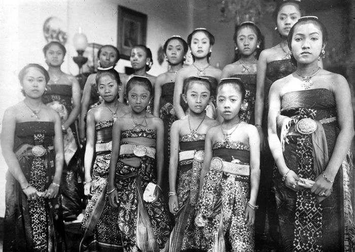 Repronegatief. Dertien dochters van Z.H. Pakoe Boewono X (1893-1939), Soesoehoenan te Surakarta.